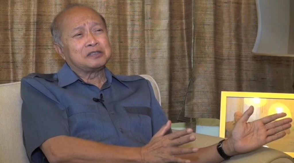 ភាសាខ្មែរ: ព្រះអង្គម្ចាស់​នរោត្តម​រណឫទ្ធិ​ ដែល​ធ្លាប់​ដឹកនាំ​គណបក្ស​ហ្វ៊ុនស៊ីនប៉ិច​ដែល​ជា​គណបក្ស​សំខាន់​មួយ​នៅ​ក្រោយ​សង្គ្រាម បាន​​ប្រកាស​នៅ​ក្នុង​បទសម្ភាសន៍​ផ្តាច់​មុខ​ជាមួយ​វីអូអេ​កាល​ពី​ថ្ងៃ​ច័ន្ទ ទី​២៤ ខែ​កុម្ភៈ​​ ឆ្នាំ​២០១៤ ថា​ព្រះអង្គ​មាន​គម្រោង​នឹង​បង្កើត​គណបក្ស​ថ្មី​មួយ​ដើម្បី​ចូល​រួម​ការ​បោះឆ្នោត​នានា​នៅ​ពេល​ខាង​មុខ។